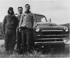 たま（プリンス）AFTF型トラック試作車、箱根でテスト中の写真。昭和26年11月から、翌年3月までの間に撮影。